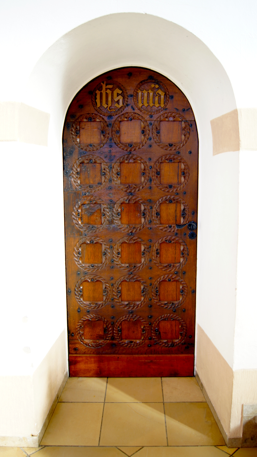 Die eicherne Sakristeitür in der Burloer Klosterkirche St. Marien (Stadt Borken,NRW) stammt aus der Zeit um 1500. In die kassettenartigen Vertiefungen sind oben die Monogramme ihs (Jesus) und ma (Maria) eingelassen. This is a photograph of an architectural monument. A1 - A 26